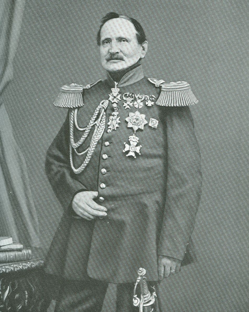 foto van Hendrik_Frederik_Carel_Duycker